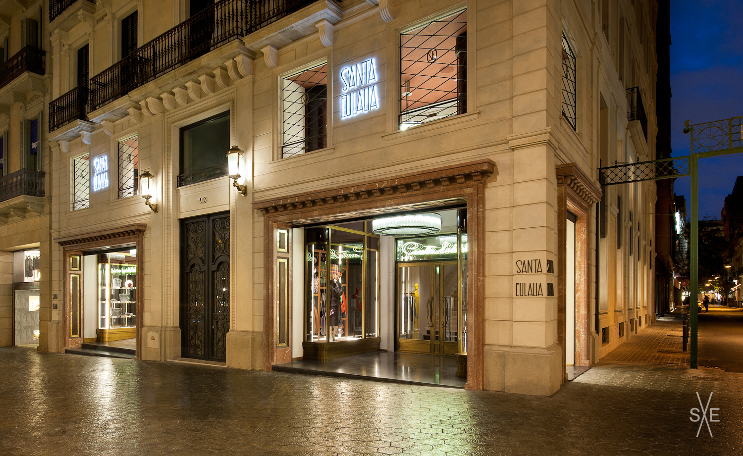 Tienda de Santa Eulalia en Barcelona